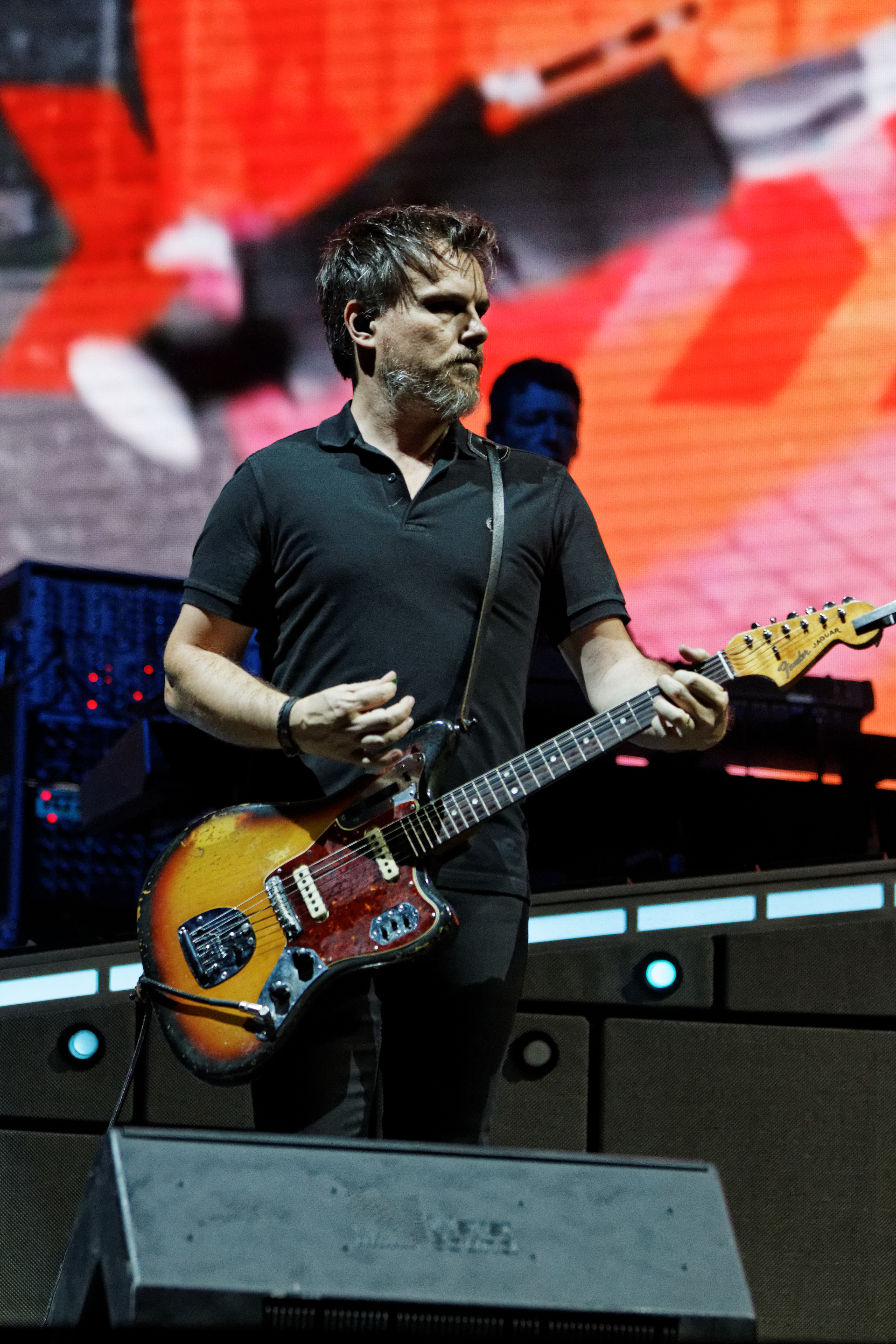 Indochine en concert sur la scène Glenmor lors du festival des Vieilles Charrues 2014.